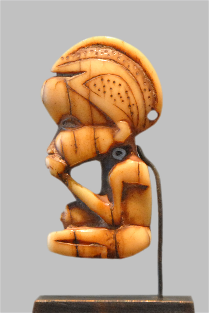 Sculpture hungana Pendentif 19ème siècle République démocratique du Congo Ivoire anciennes collections Stephen Chauvet, Maurice Ratton Don Guy Ladrière, 1997 Pavillon des Sessions Musée du quai Branly